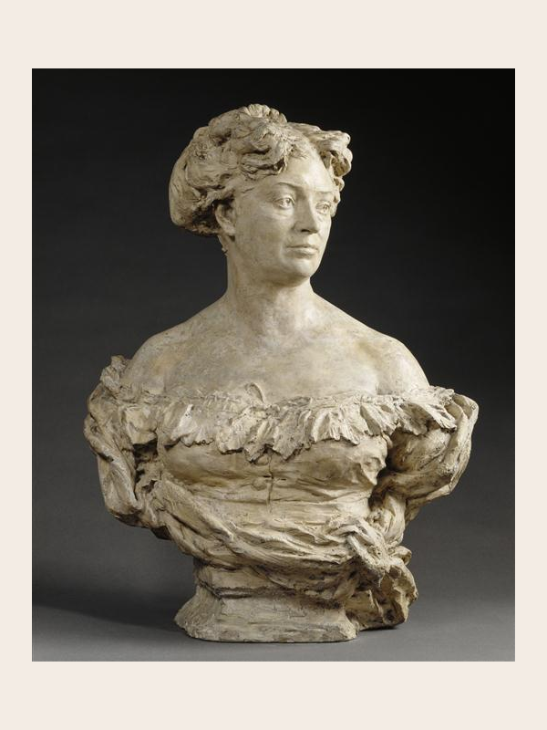 Jean-Baptiste Carpeaux.- Madame Alexandre Dumas, née Nadedja de Knorring.